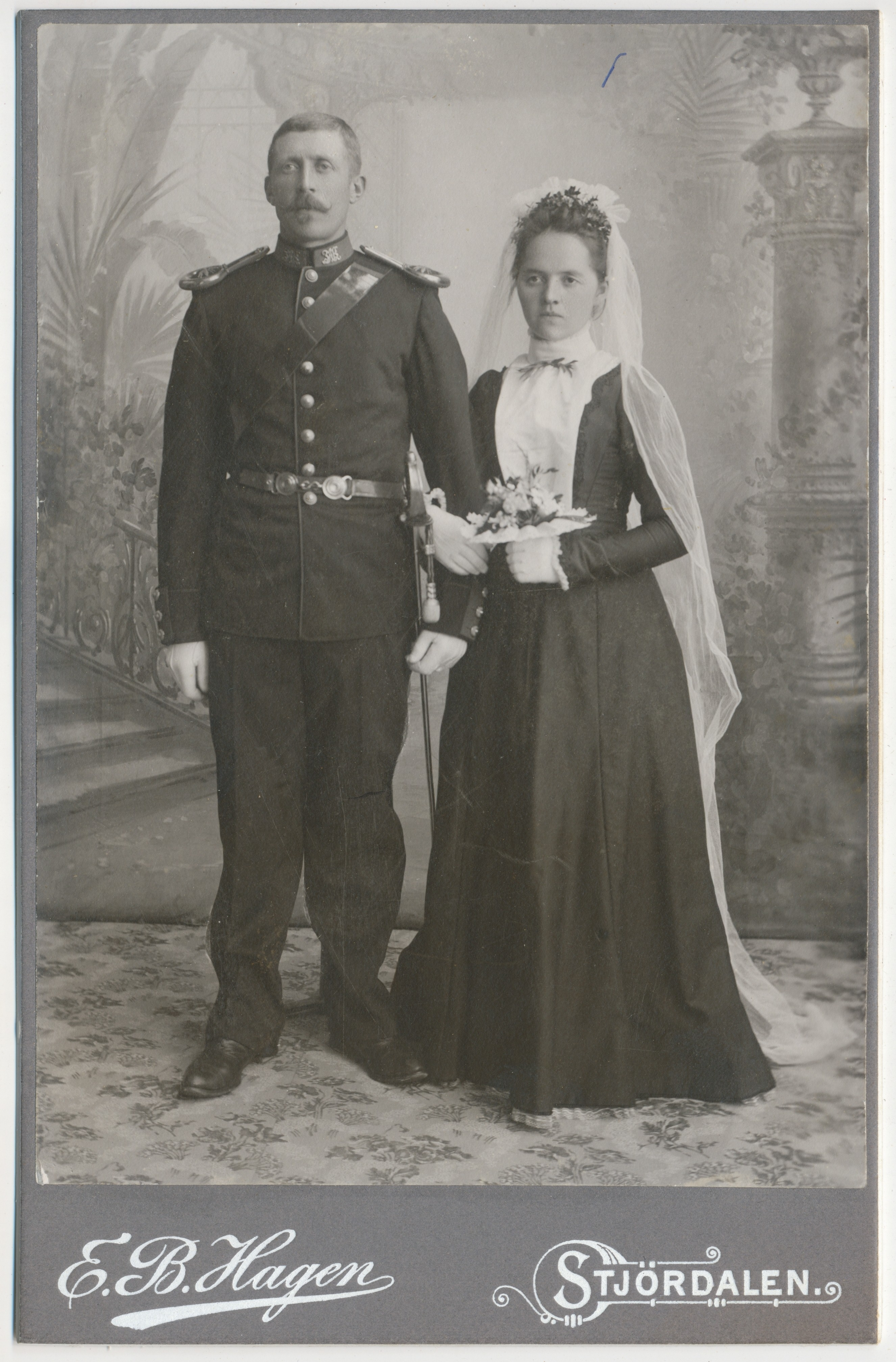 Brudeparet Kasper Petersen (f. 1867 i Skatval, d. 1947) og Petrine P. Fiskvik (f. 1878, d. 1957). Se Stjørdalsboka IV, s. 473 og 712. Bosatt i Skatval, senere i Trondheim. Kaspers mor var Kirsten Kristoffersdatter Nordaunet fra Åsen, se Bygdebok for Åsen V, s. 227.